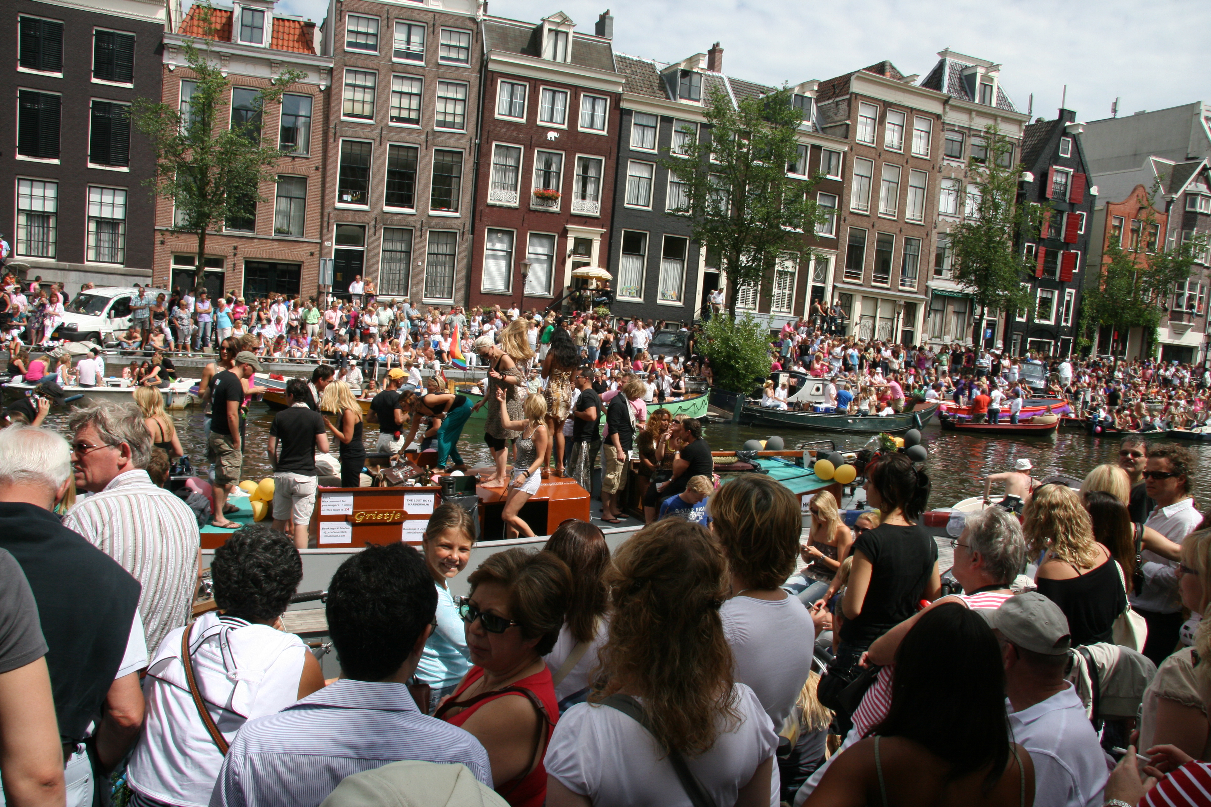 Olanda, Amsterdam